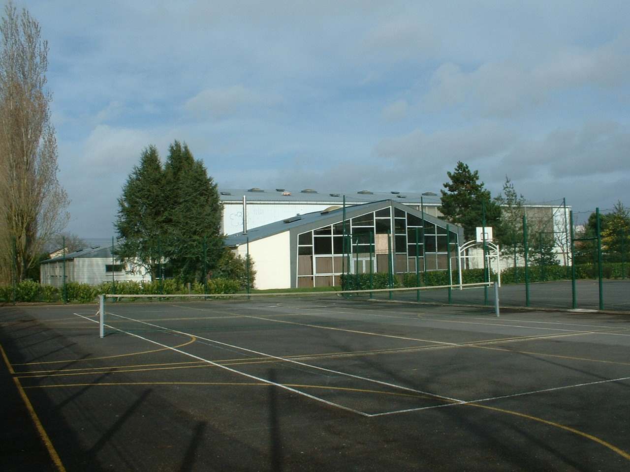 Gymnase de l'Ouche Dinier